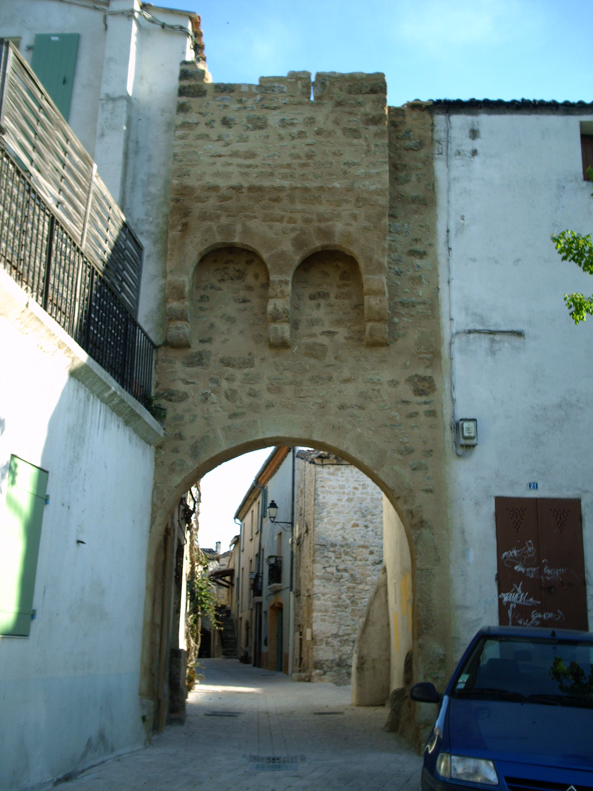 Porte médievale à Prades-le-Lez (Hérault)